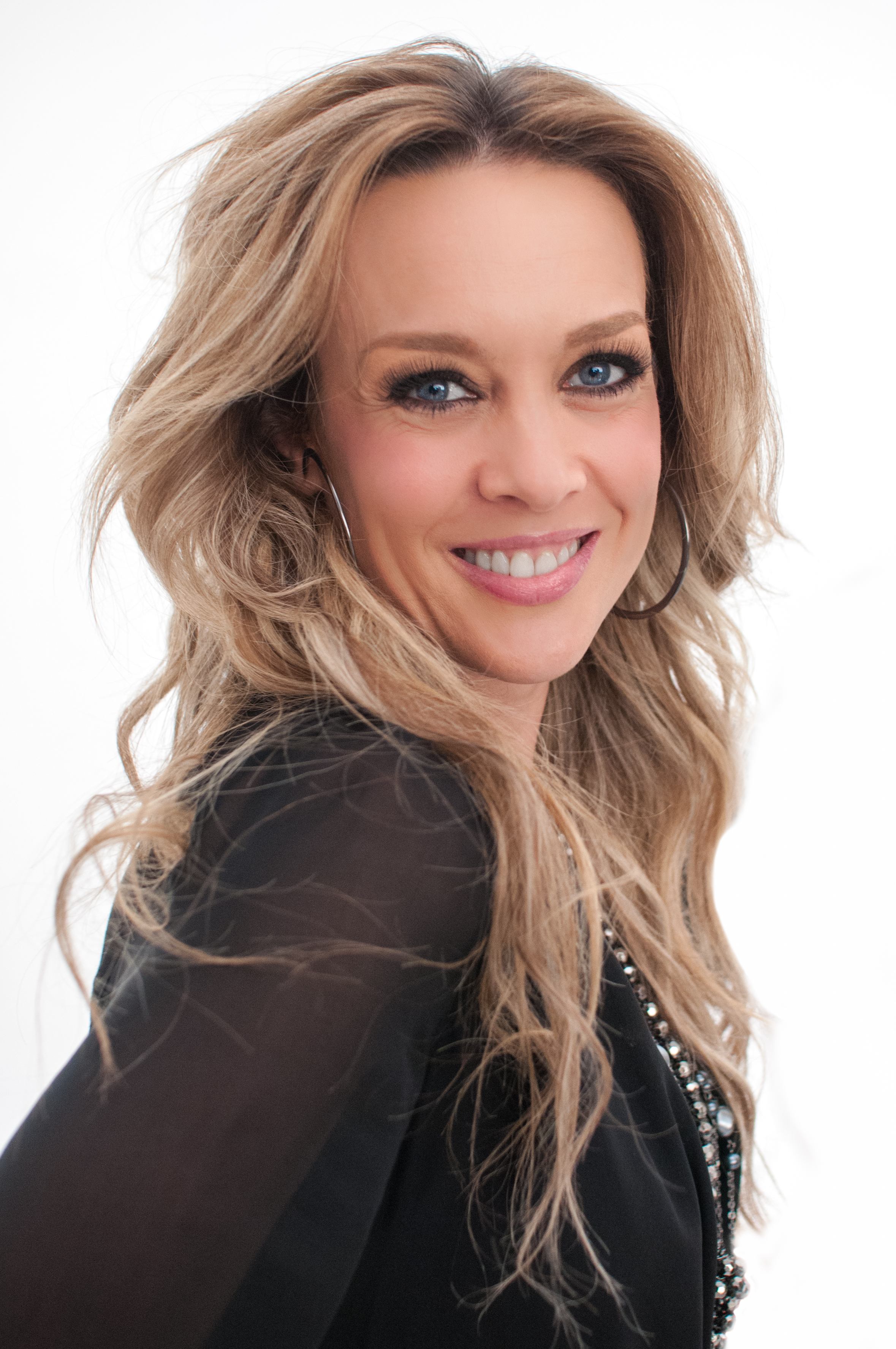 María Fernanda Blázquez Gil nació en 1973 y lanzó su primer disco en 1995. Su última producción es Primera Fila, del 2012.